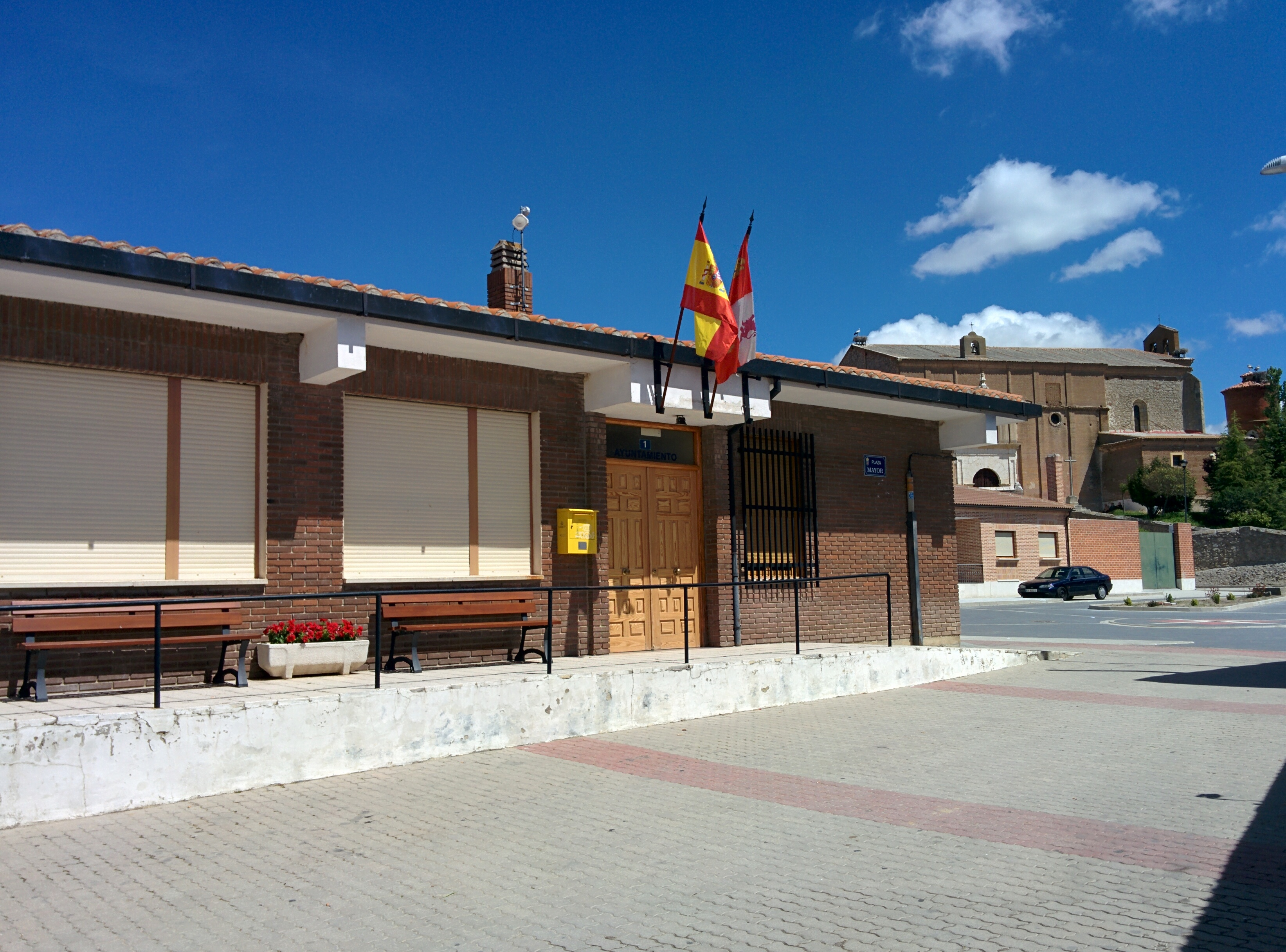 Casa consistorial de Rubí de Bracamonte (Valladolid, España).